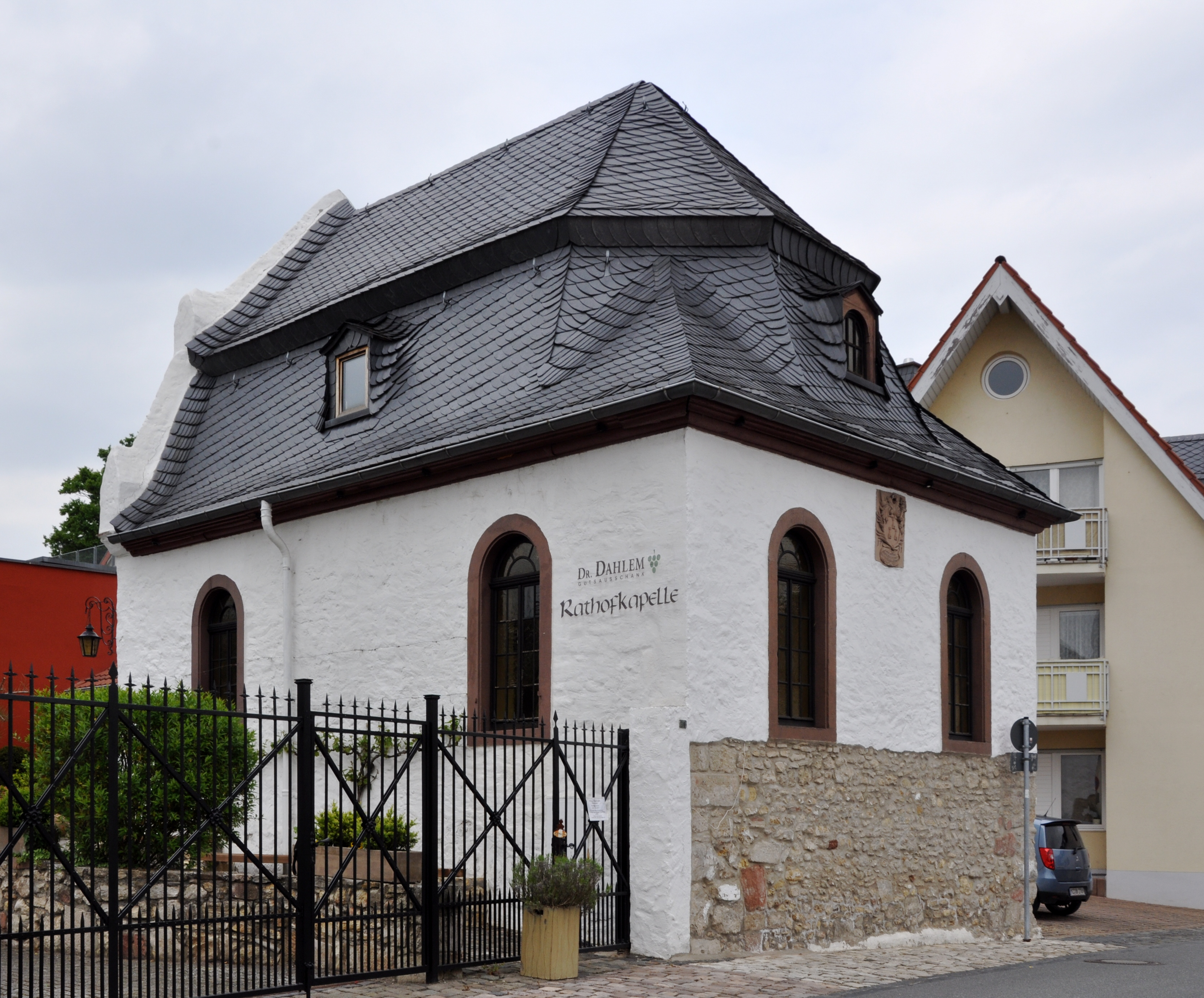 Oppenheim, Weingut Dahlem, Rathofkapelle (Kapelle des ehem. Eberbacher Hofs)